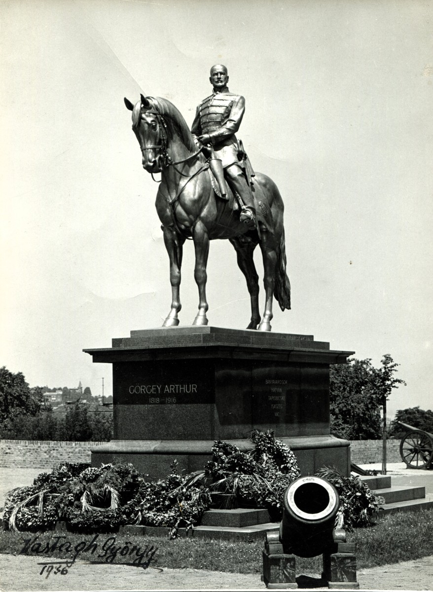 ifj. Vastagh György: Görgei Artúr lovas szobra Budapesten